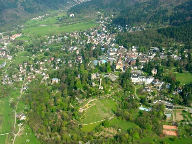 Luftbild von Badenweiler aufgenommen bei einer Ballonfahrt